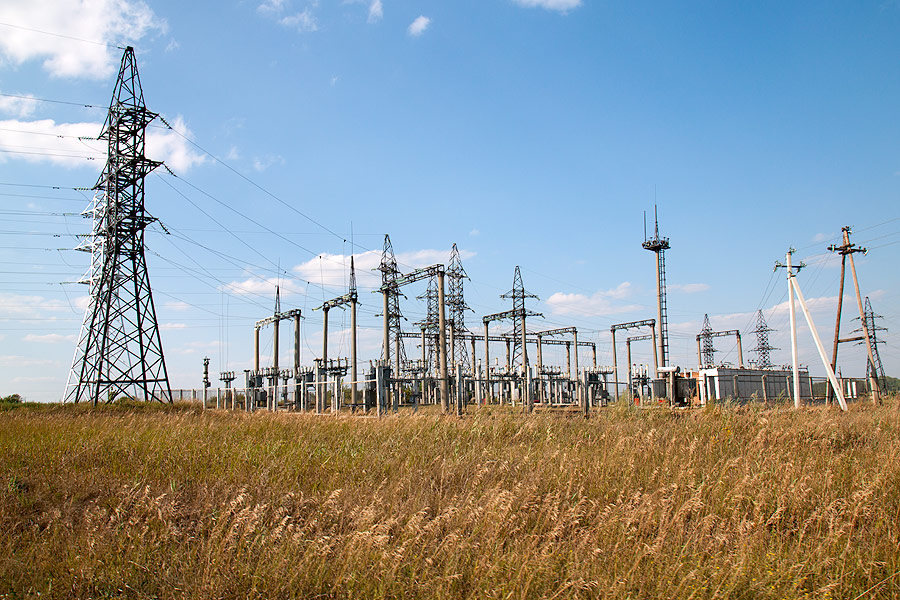 Село Санниково (Алтайский край). Распределительная трансформаторная подстанция 35/10 кВа «Санниковская»